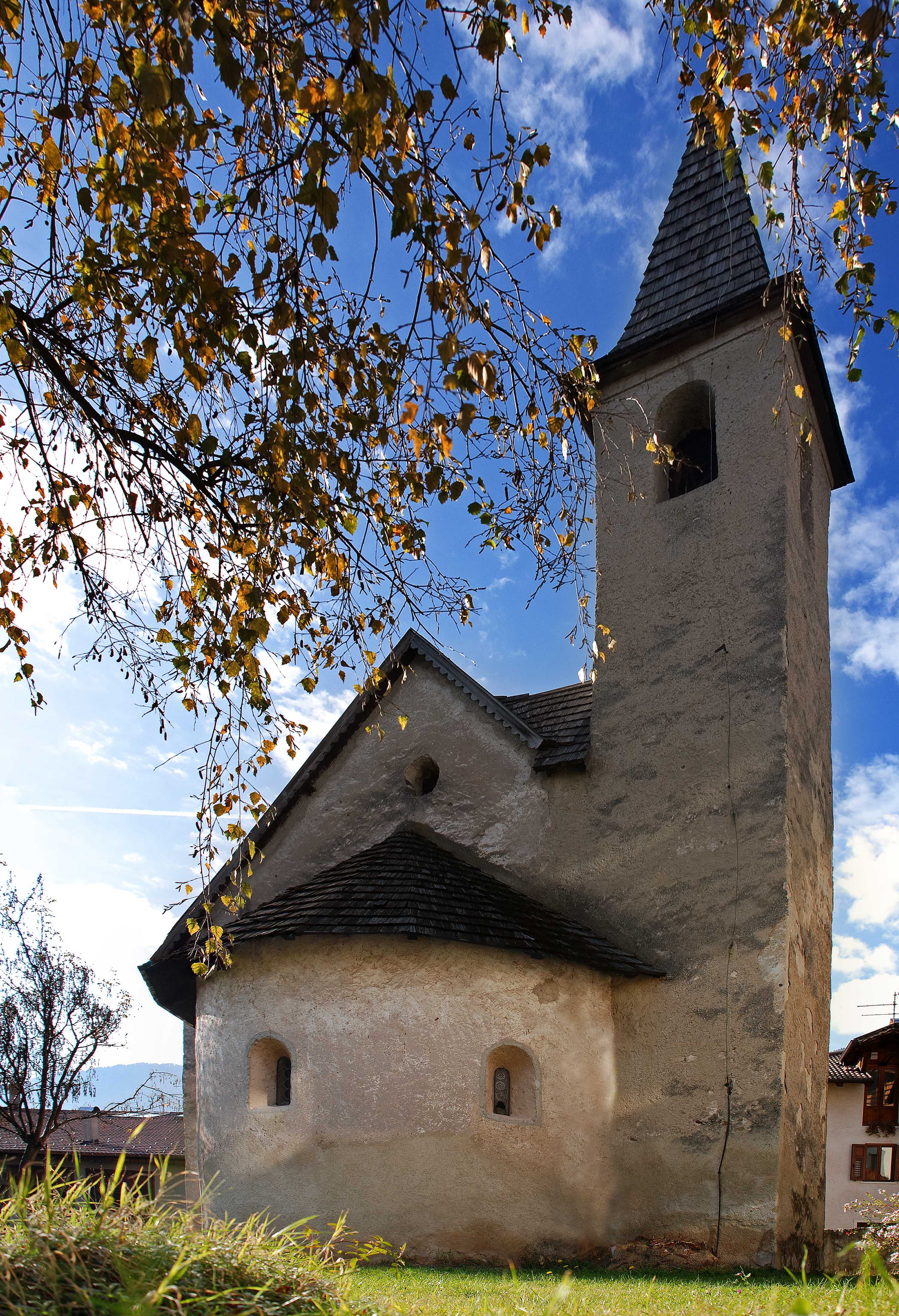 Antica Chiesa di San Vigilio a Cles (Italia) risalente all'anno 300 D.C. circa